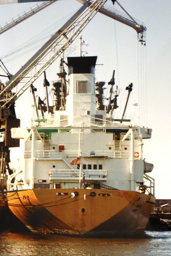 Blick auf den Stückgutfrachter Mangan